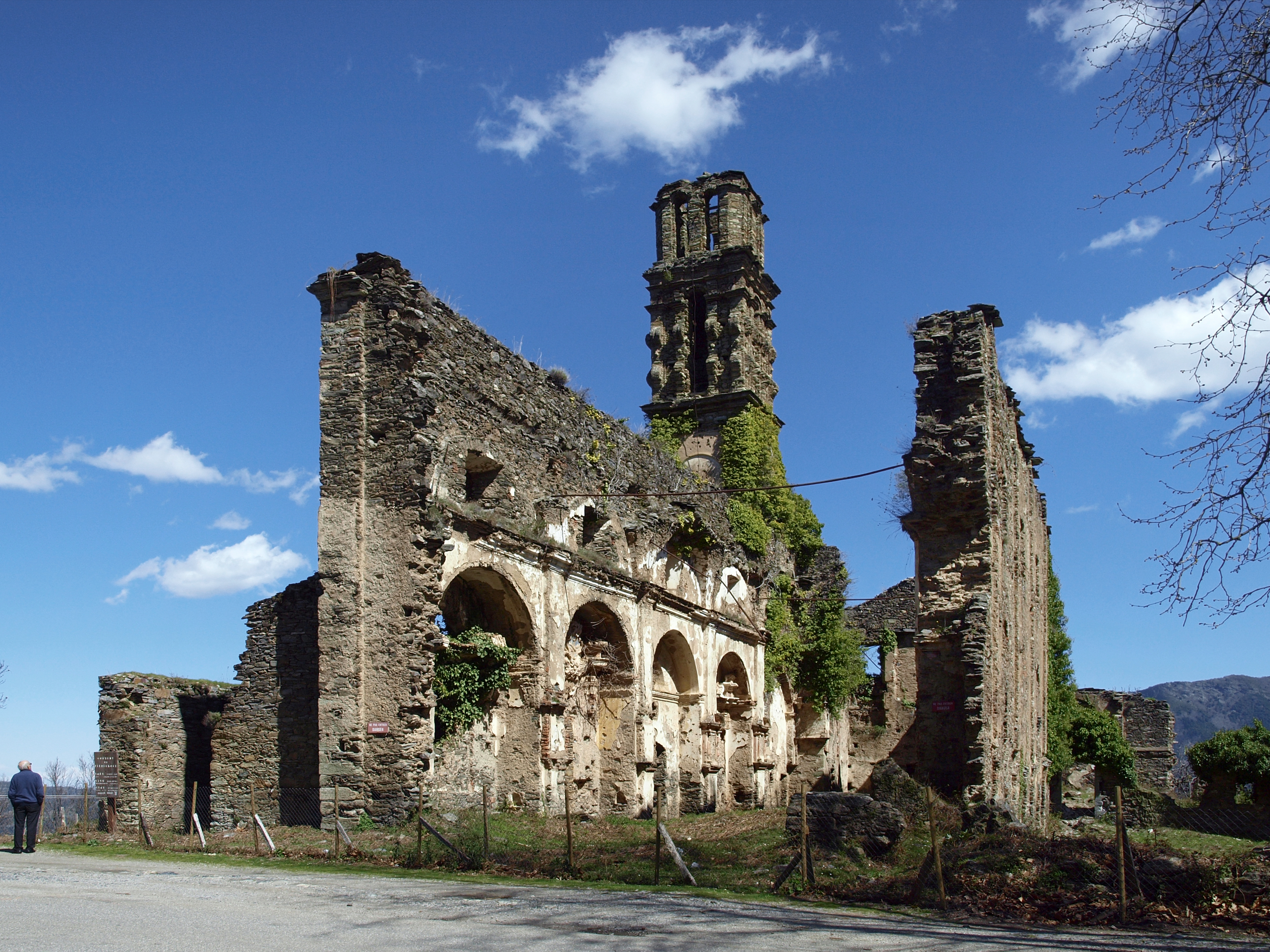 Piedicroce (Corsica) - Ruines du couvent franciscain d'Orezza